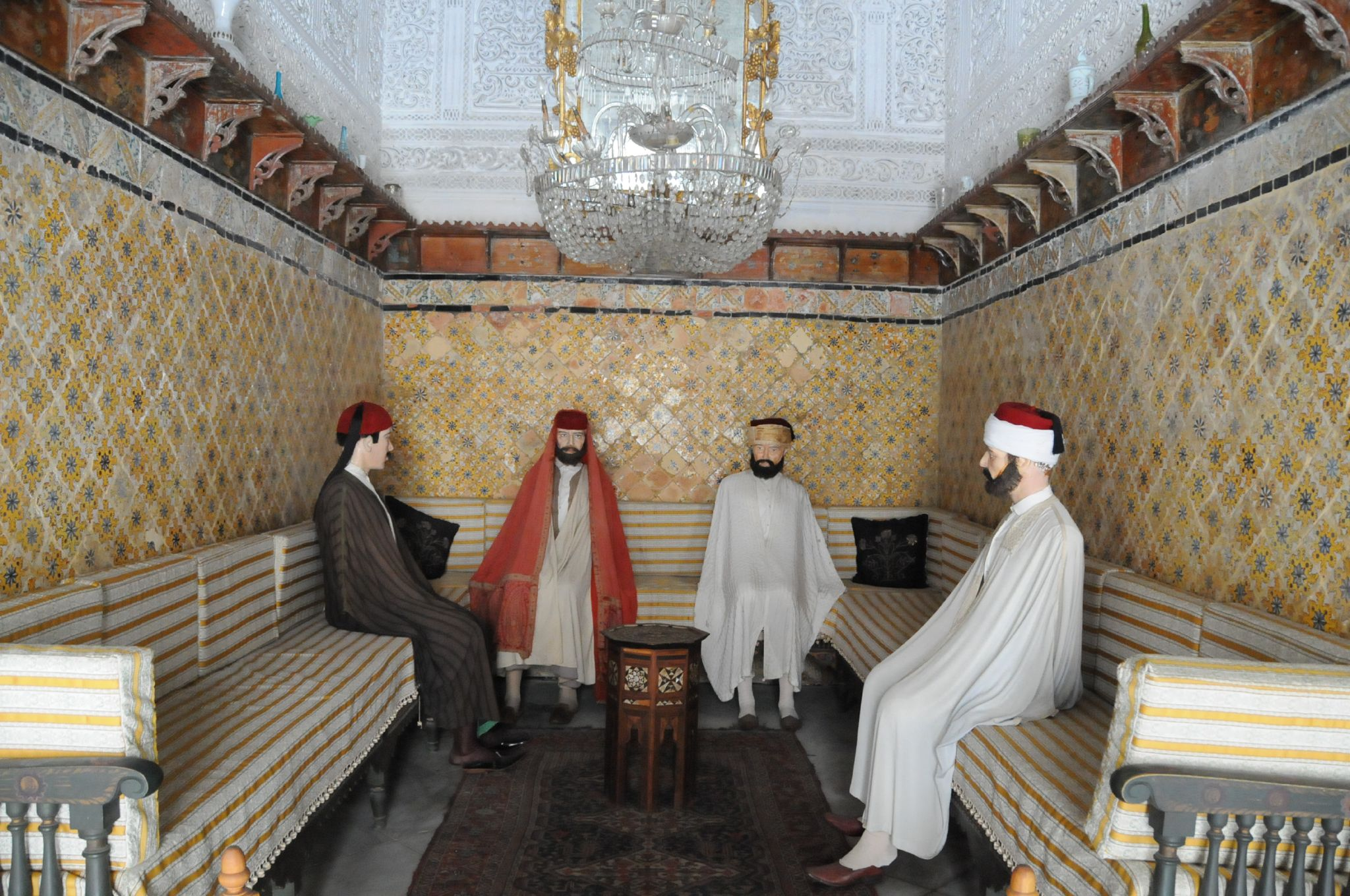 Dar Ben Abdallah dans la médina de Tunis, Tunisie